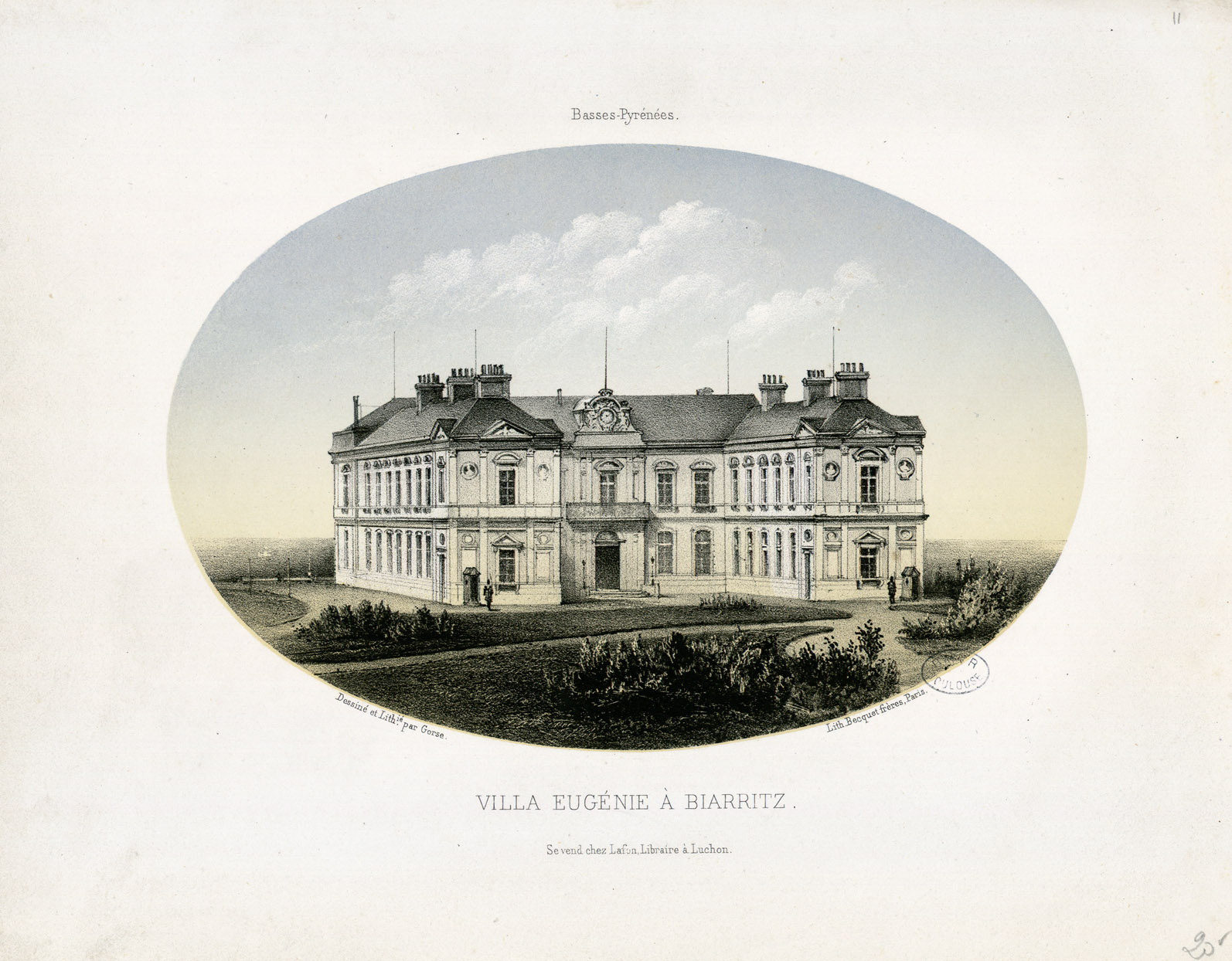 Fait partie d'un ensemble de 13 planches dessinées et lithographiées par Gorse chez Becquet frères à Paris. Distribution chez Lafon, libraire à Luchon. Les pl. 1 à 8 concernent Luchon et ses environs, les pl. 9 à 13 concernent les Hautes et les Basses-Pyrénées. Ancely, René (1876 - 1966). Possesseur